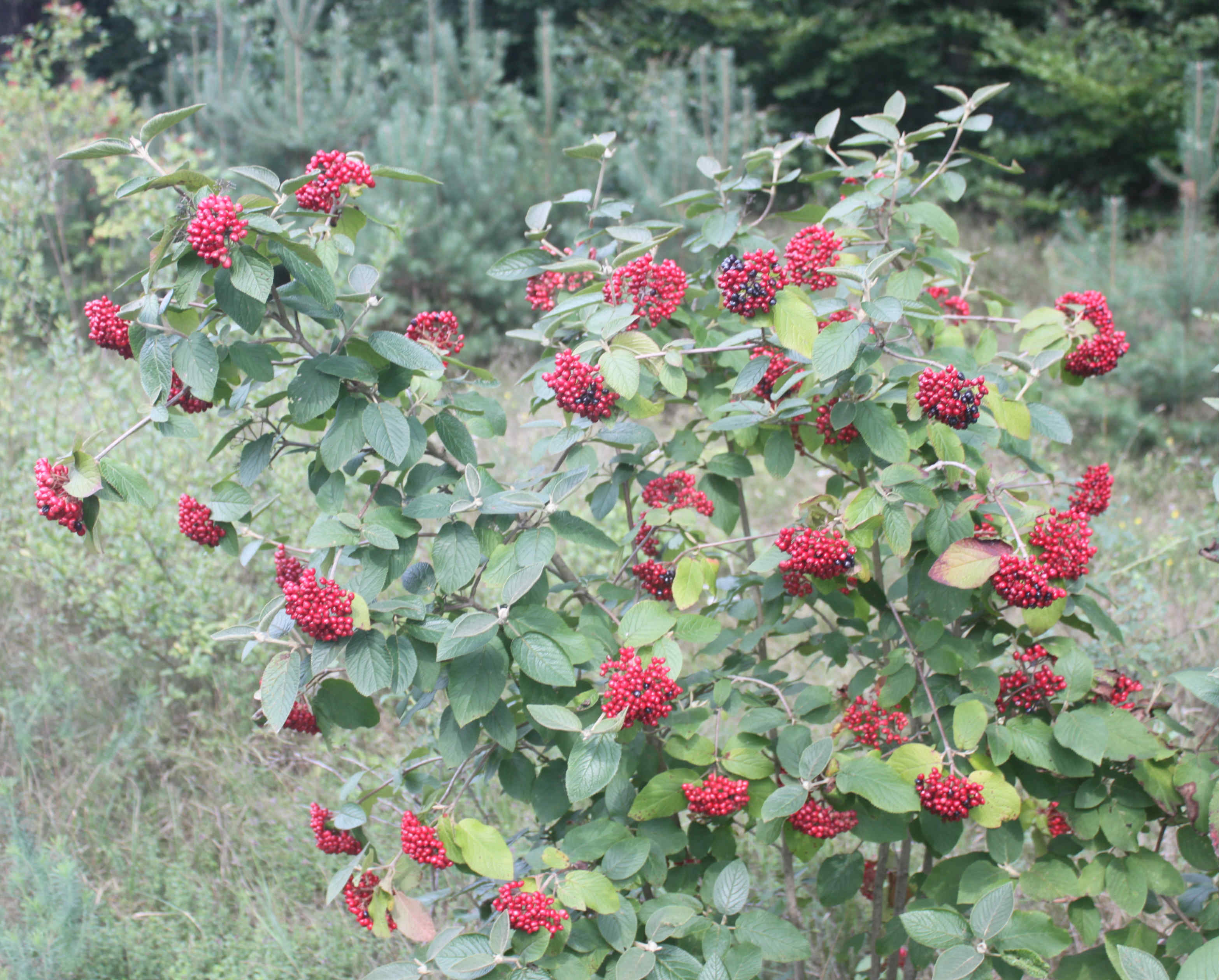 Wolliger Schneeball (Viburnum lantana) am 23.7.2014 in der Schwetzinger Hardt